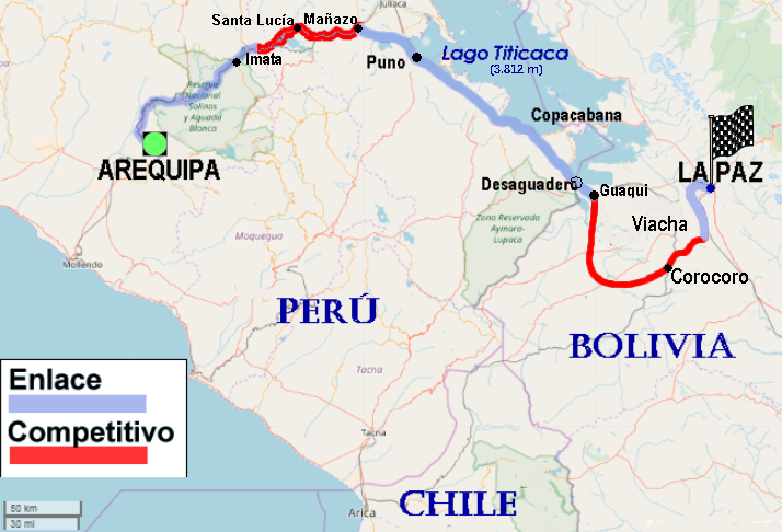 Dakar Rally 2018. Mapa de Etapa 6. Arequipa-La Paz.